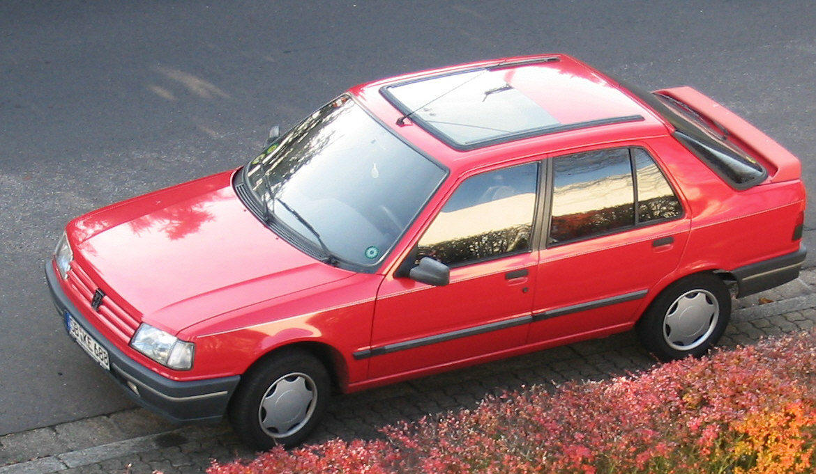 Peugeot 309 SX